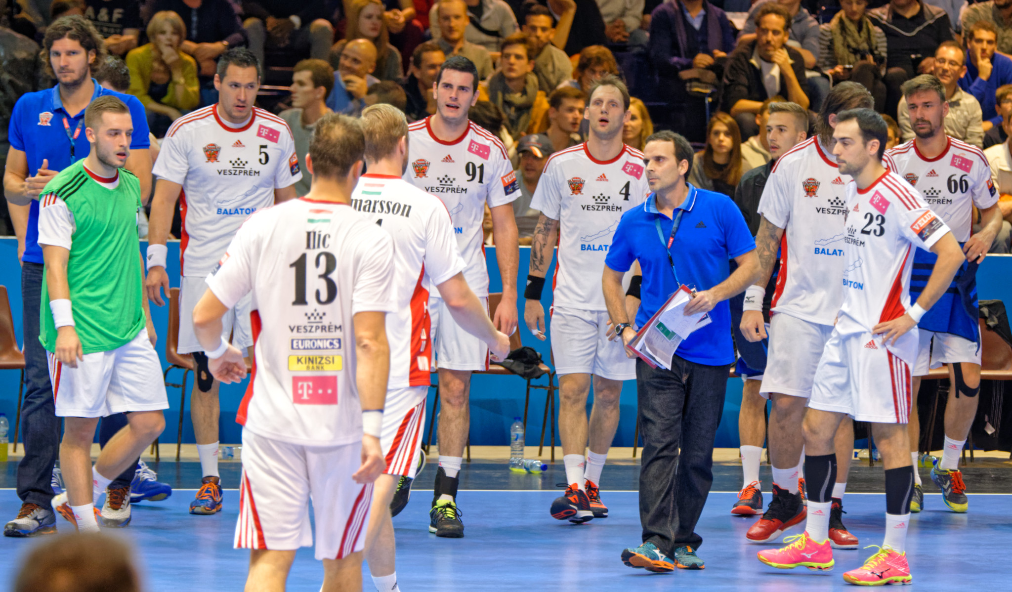 Rencontre de ligue des champions entre le PSG et Veszprem. A la Halle Carpentier (Paris), le 25 octobre 2015.